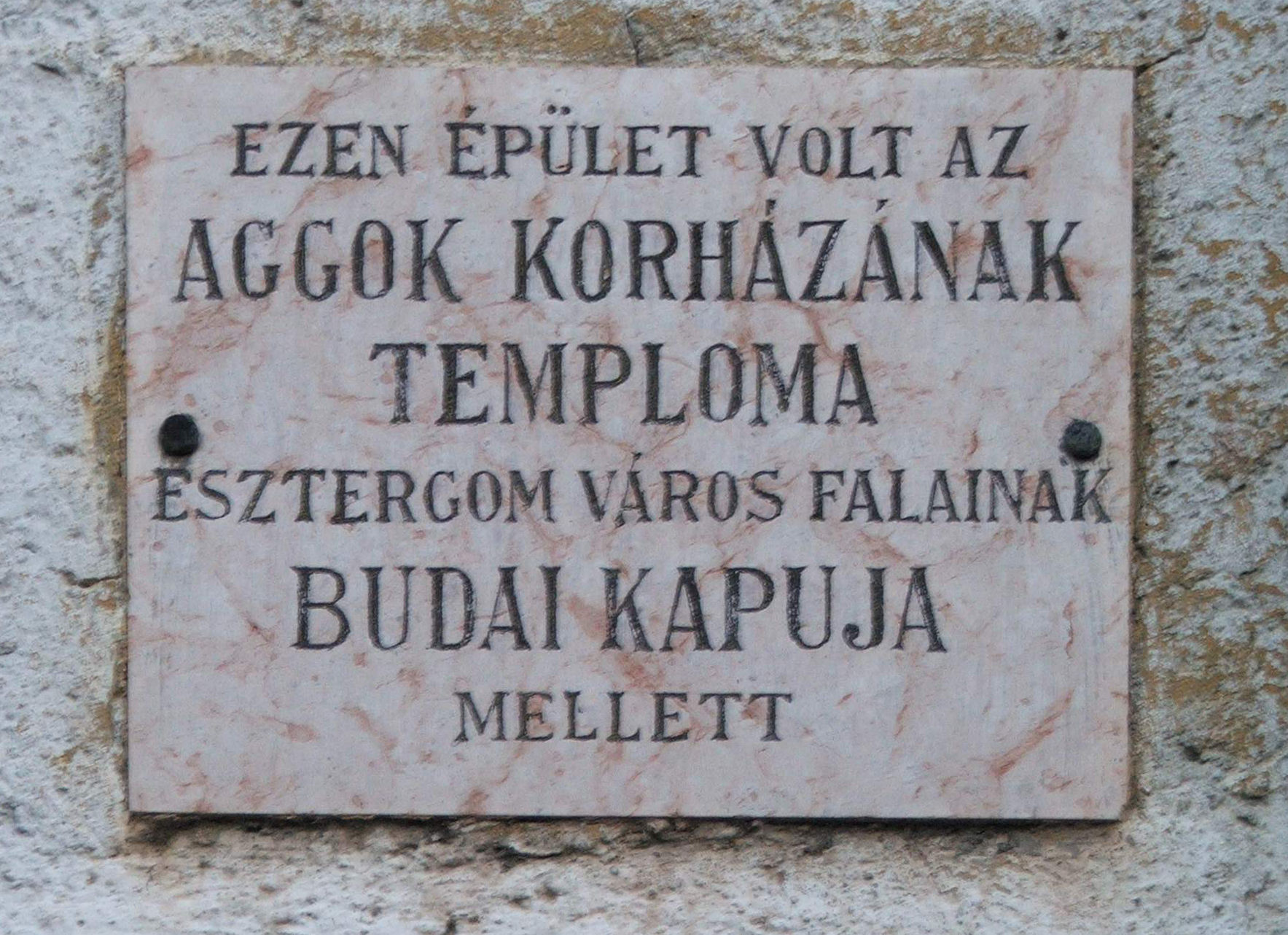 Az egykori Aggok háza vagy más néven Dóczy-ház egyike Esztergom műemlékeinek. 1710 és 1838 között szegényházként működött. Kossuth Lajos utca 62